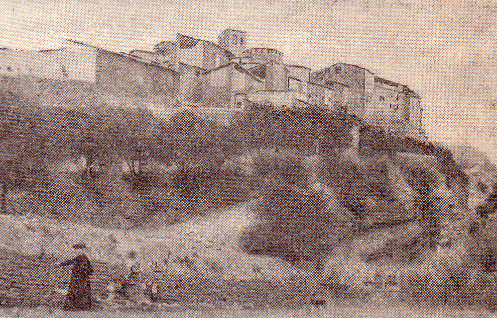 La vila de Talarn el 1900 (Pallars Jussà)